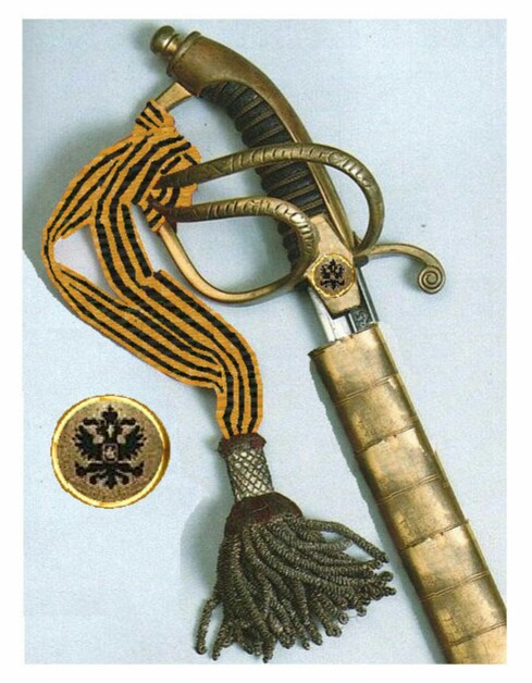 Broń Złota Orderu św. Jerzego